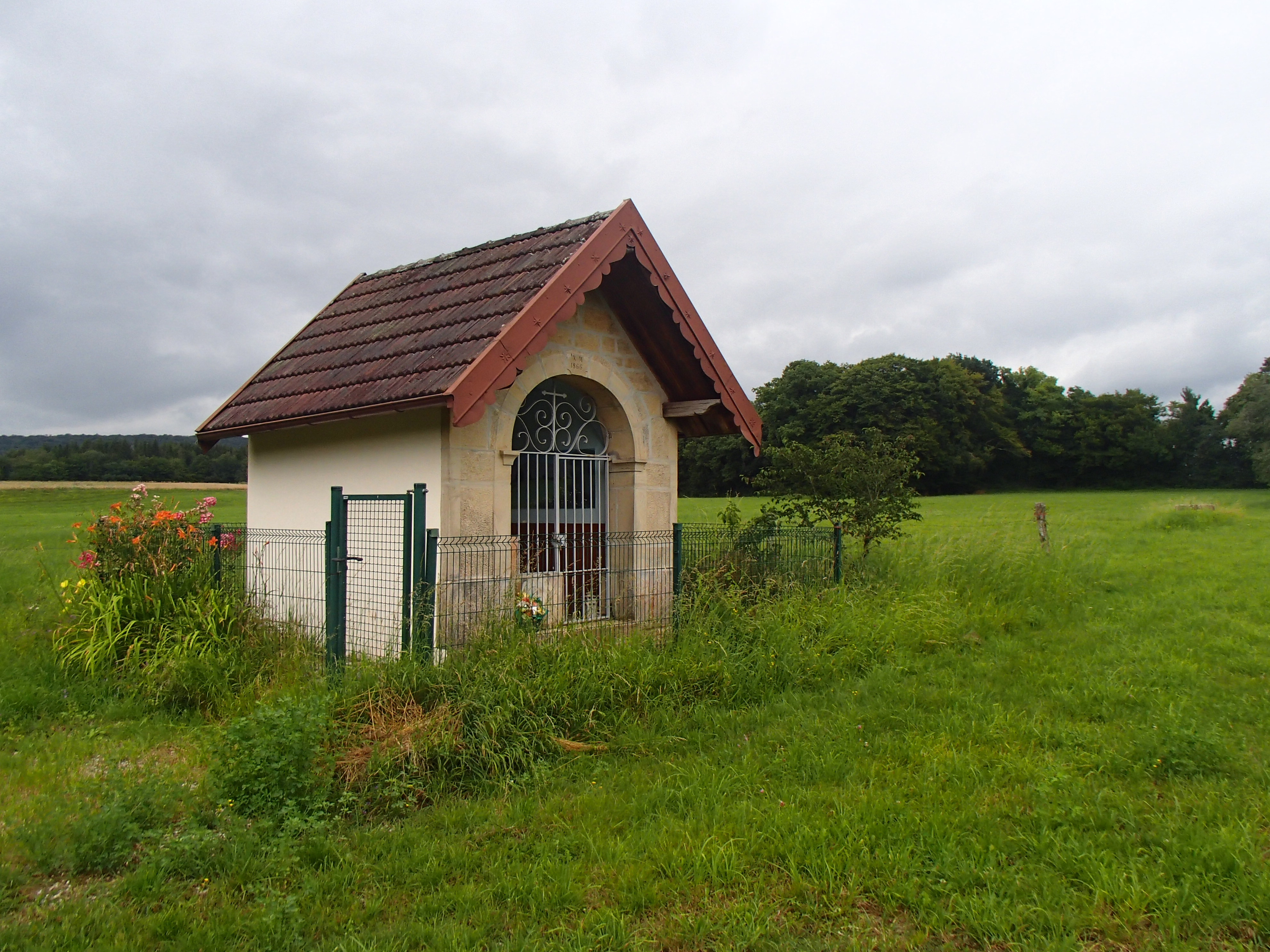 chapelle dans un champs à la combe viollot